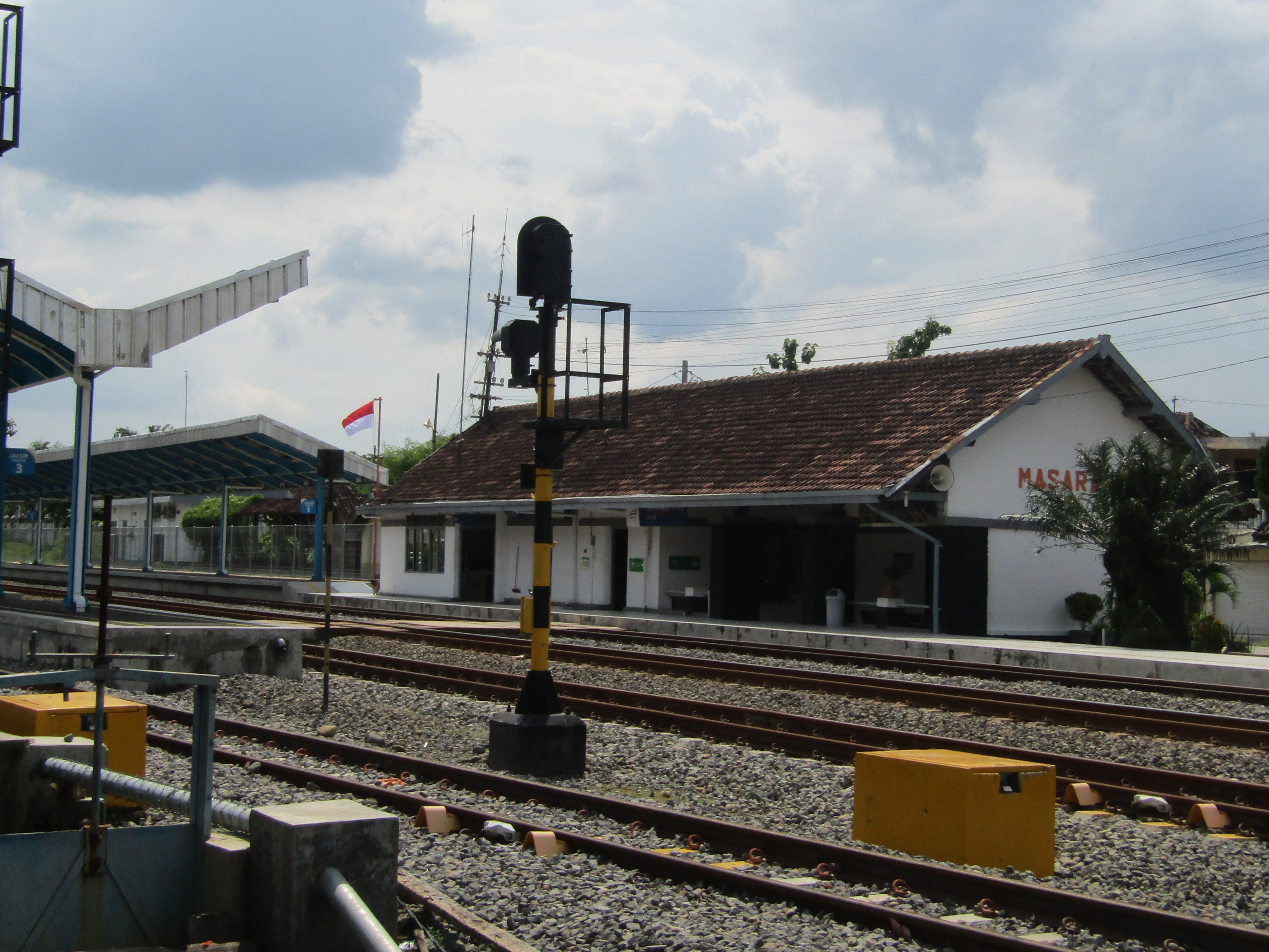 Stasiun Masaran, 2020